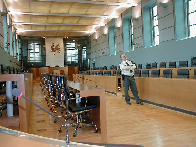 Walon: Pårlumint del Walonreye a Nameur : mwaisse såle